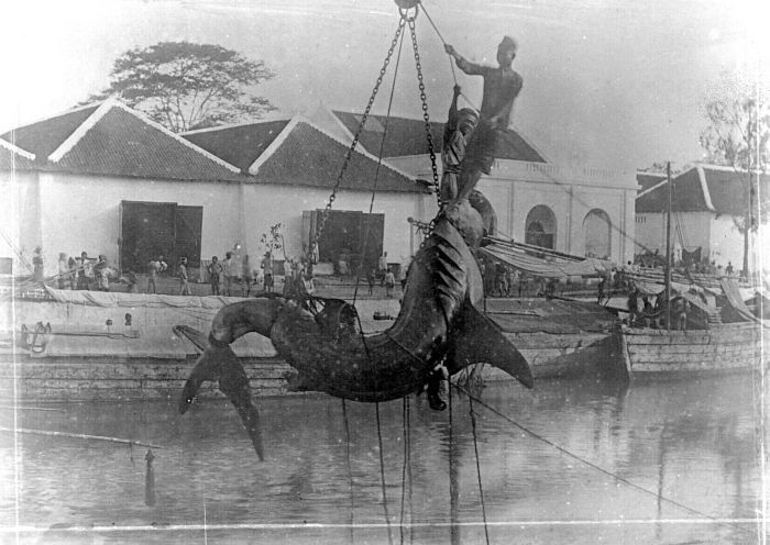 Repronegatief. In de Indonesische Archipel komen zo'n 45 soorten haaien voor. Ze spraken en spreken sterk tot de verbeelding, zeker de meer spectaculaire soorten zoals op de foto afgebeeld. Naast tijger en krokodil behoorde de haai ongetwijfeld tot de groep der meest gevreesde dieren. De grotere soorten en exemplaren waren de krokodil trouwens de baas. Vlees van haaien wordt gegeten en de bekende haaienvinnen speelden een rol in de handel met China (net als eetbare vogelnestjes en zeekomkommers). (P. Boomgaard, 2001). Reuzenhaai, gevangen in Straat Madoera